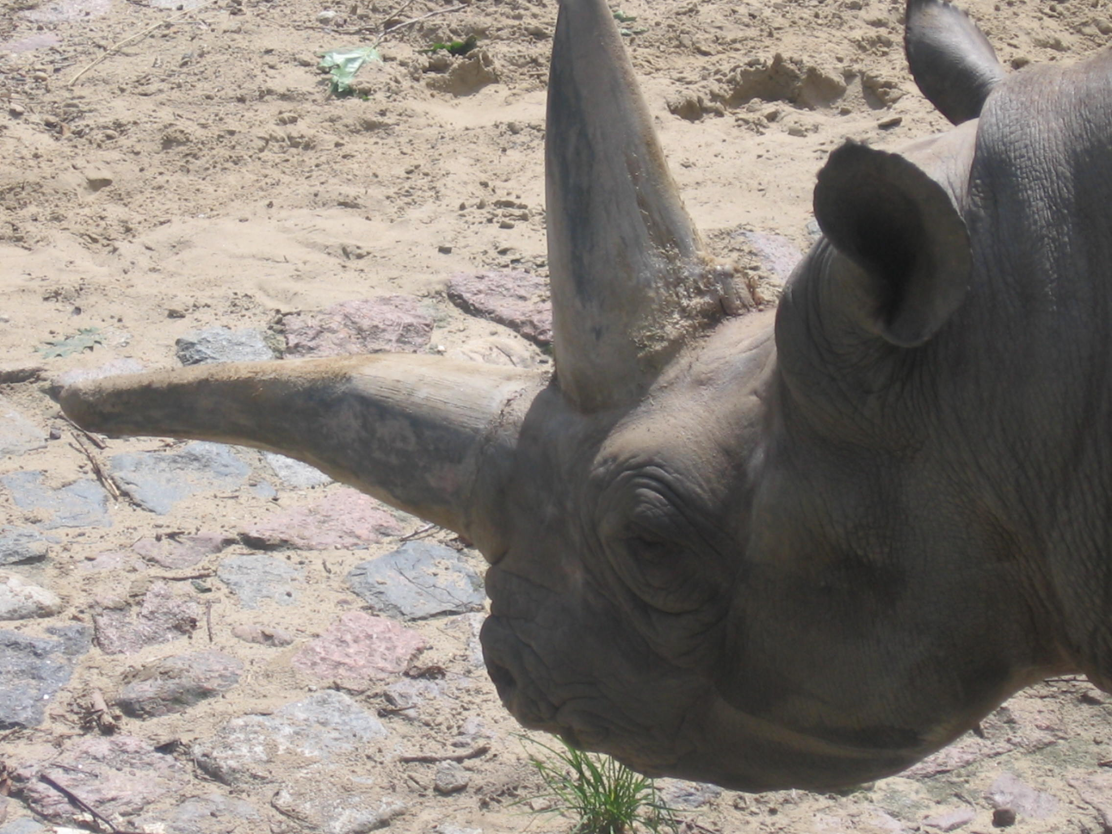 black rhino